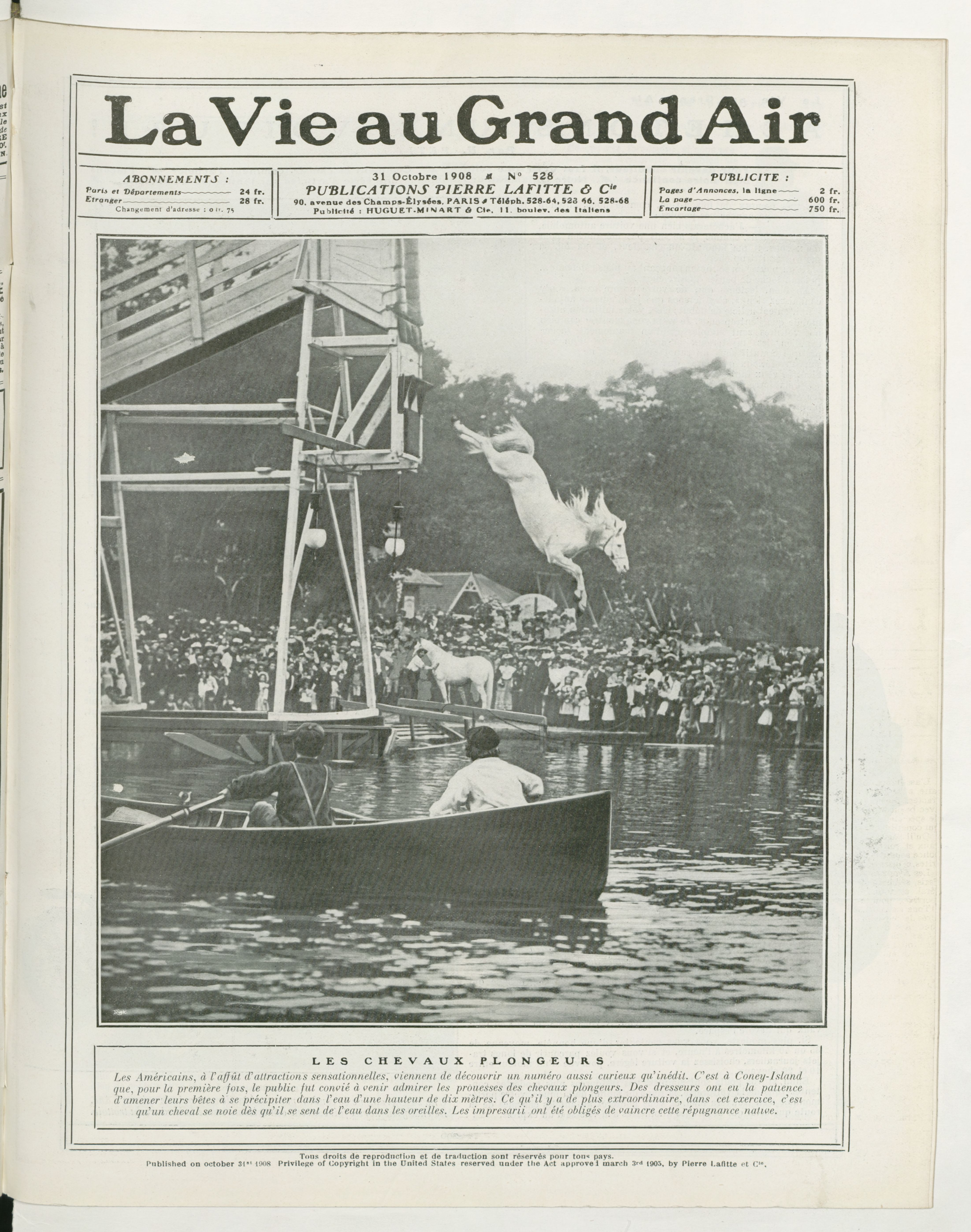 Spectacle de chevaux plongeurs à Coney-Island